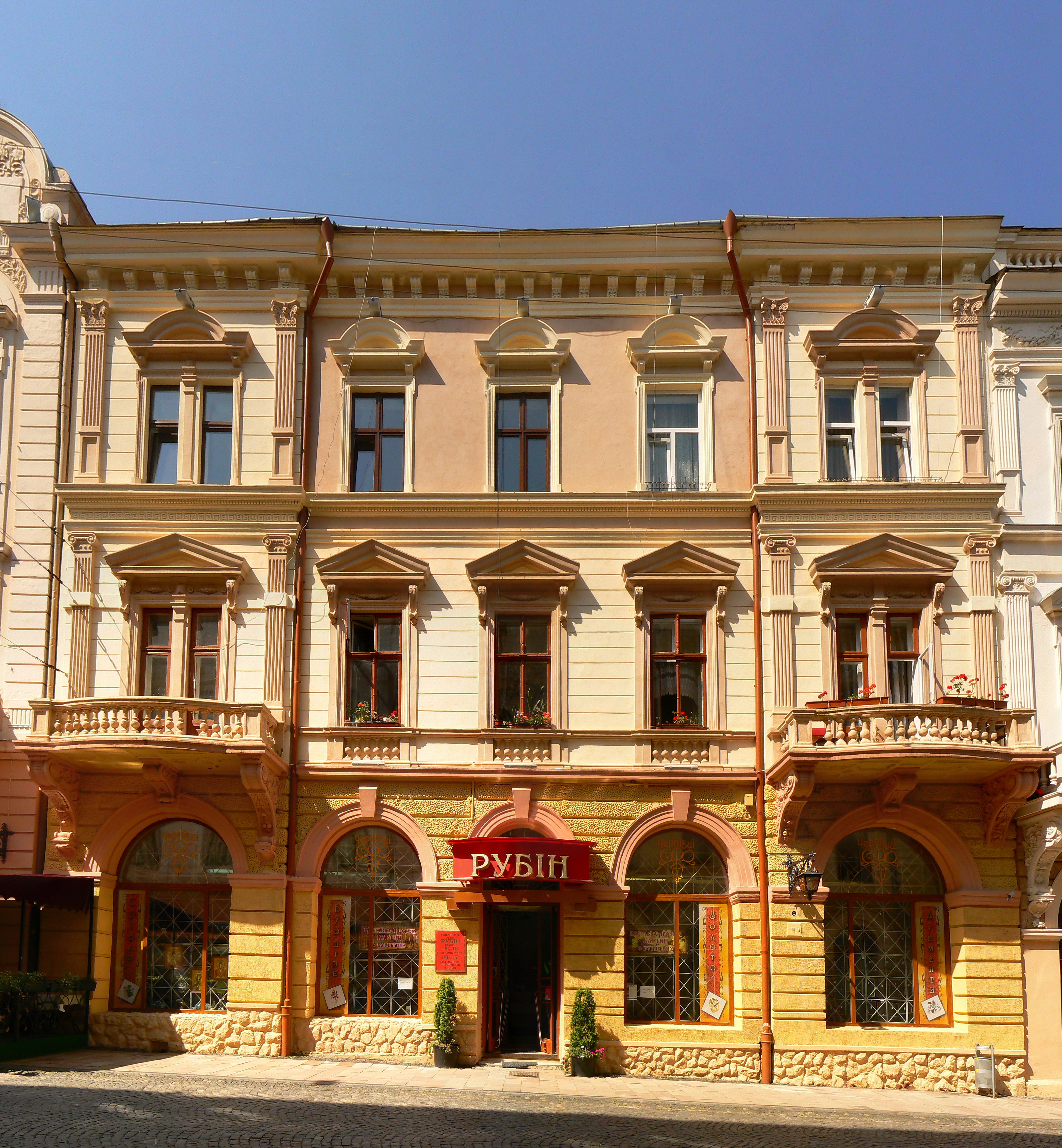 Кобилянської, 10